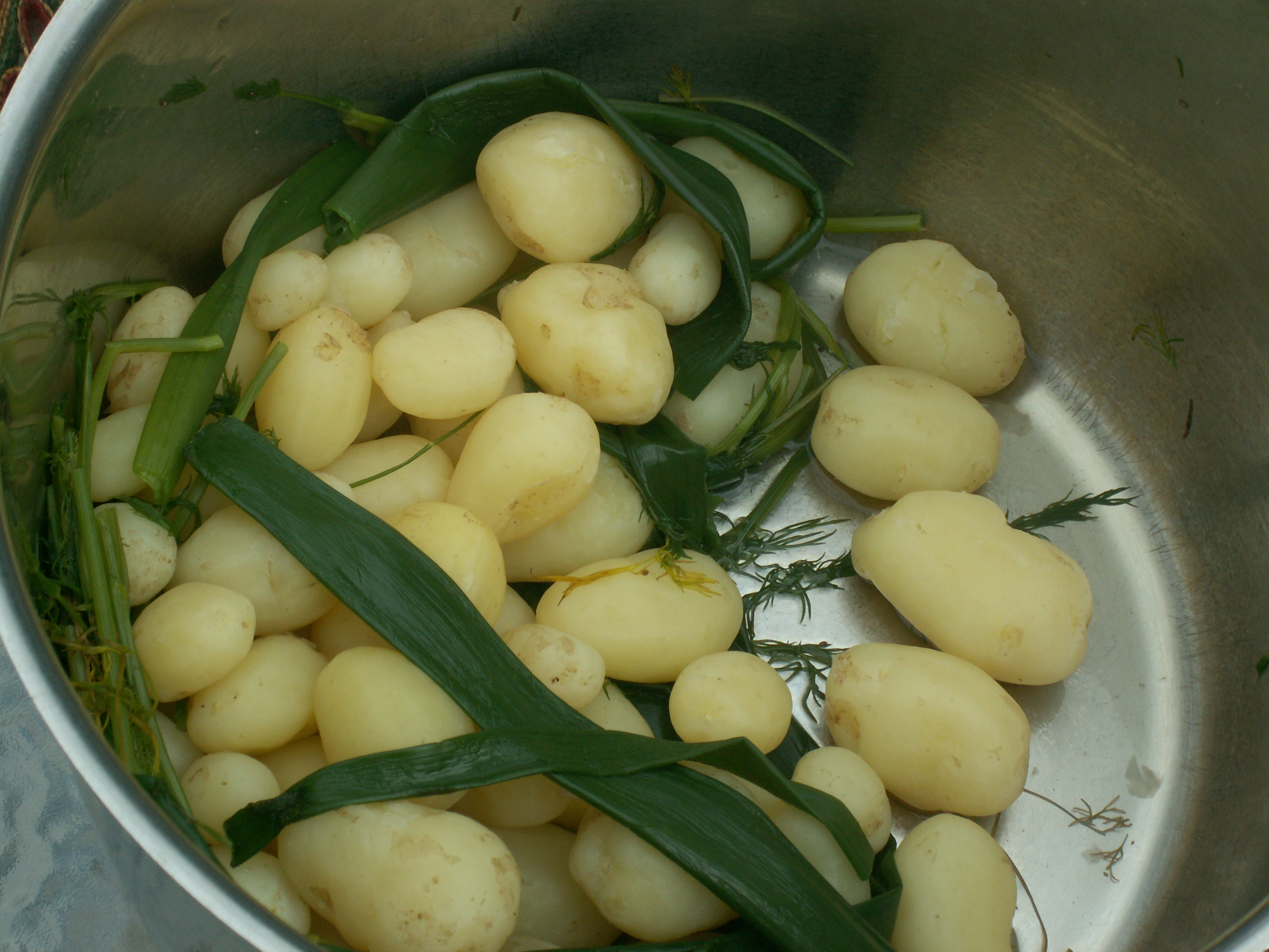 Uuden sadon perunoita kesällä 2008